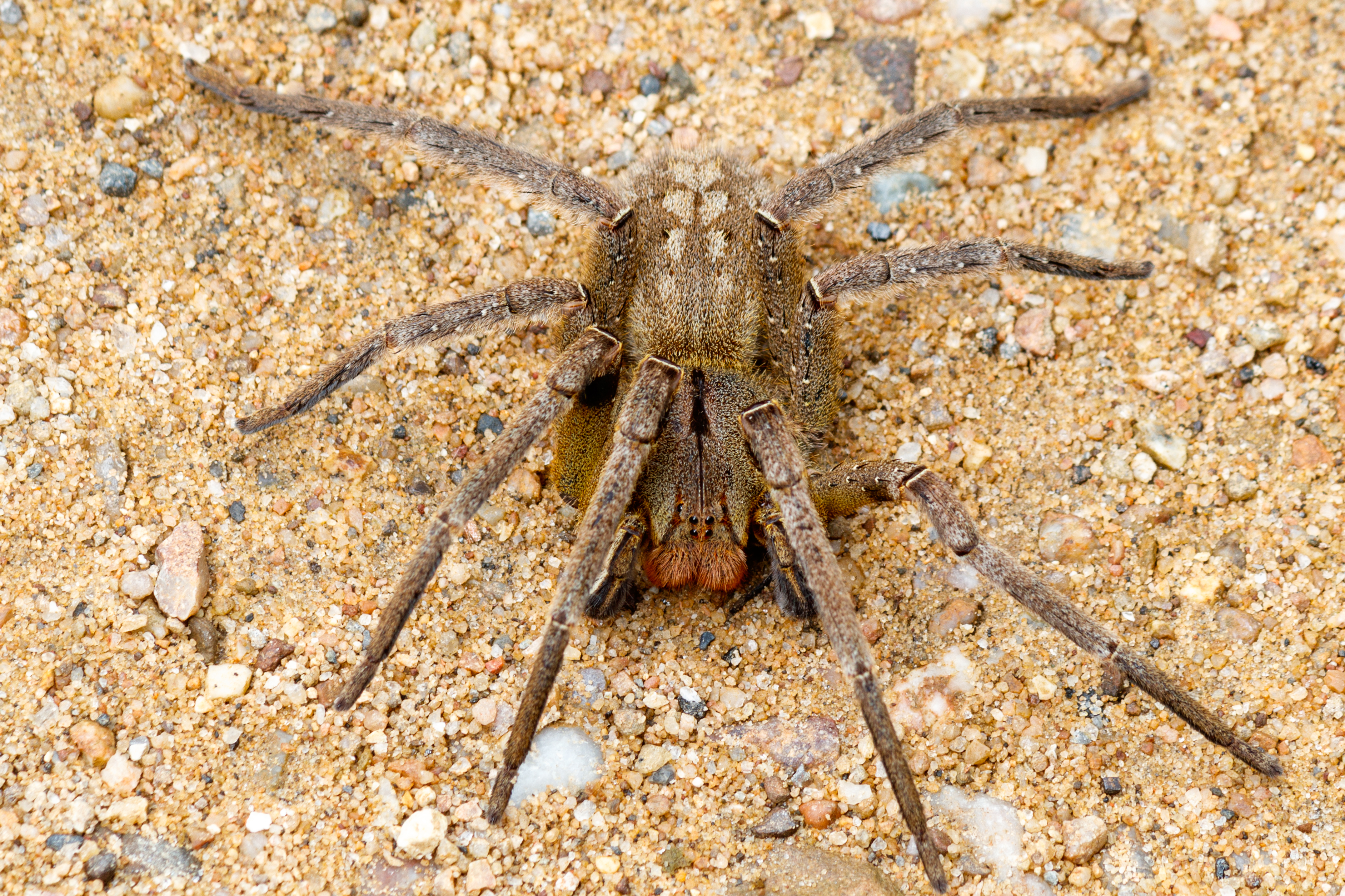 Núcleo Santana por Rodrigo Tetsuo Argenton feitas na expedição PETAR fevereiro 2020